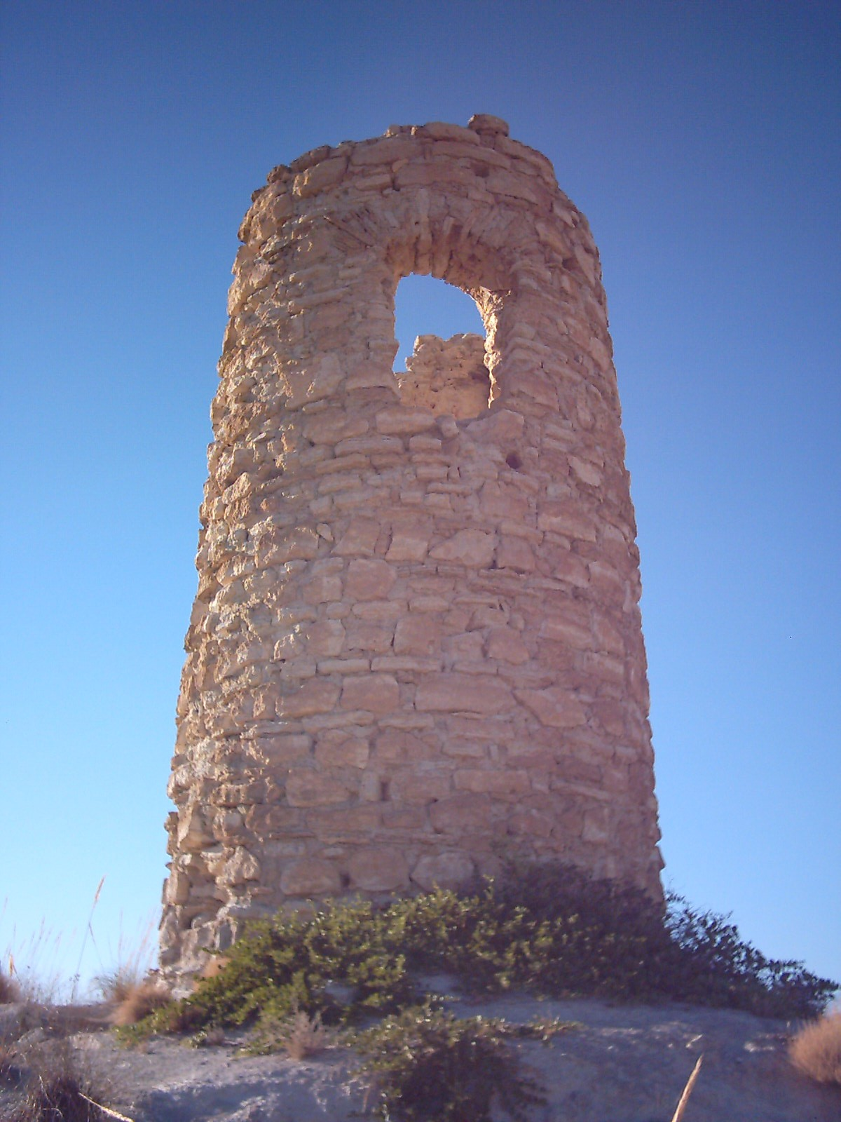 Torre de La Cañada, situada en el municipio de Cortes de Baza, Granada (España). Formaba parte del sistema defensivo nazarí del siglo XIV en la Hoya de Baza.